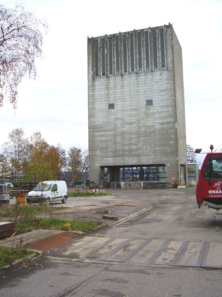 puits Vouters mine de charbon